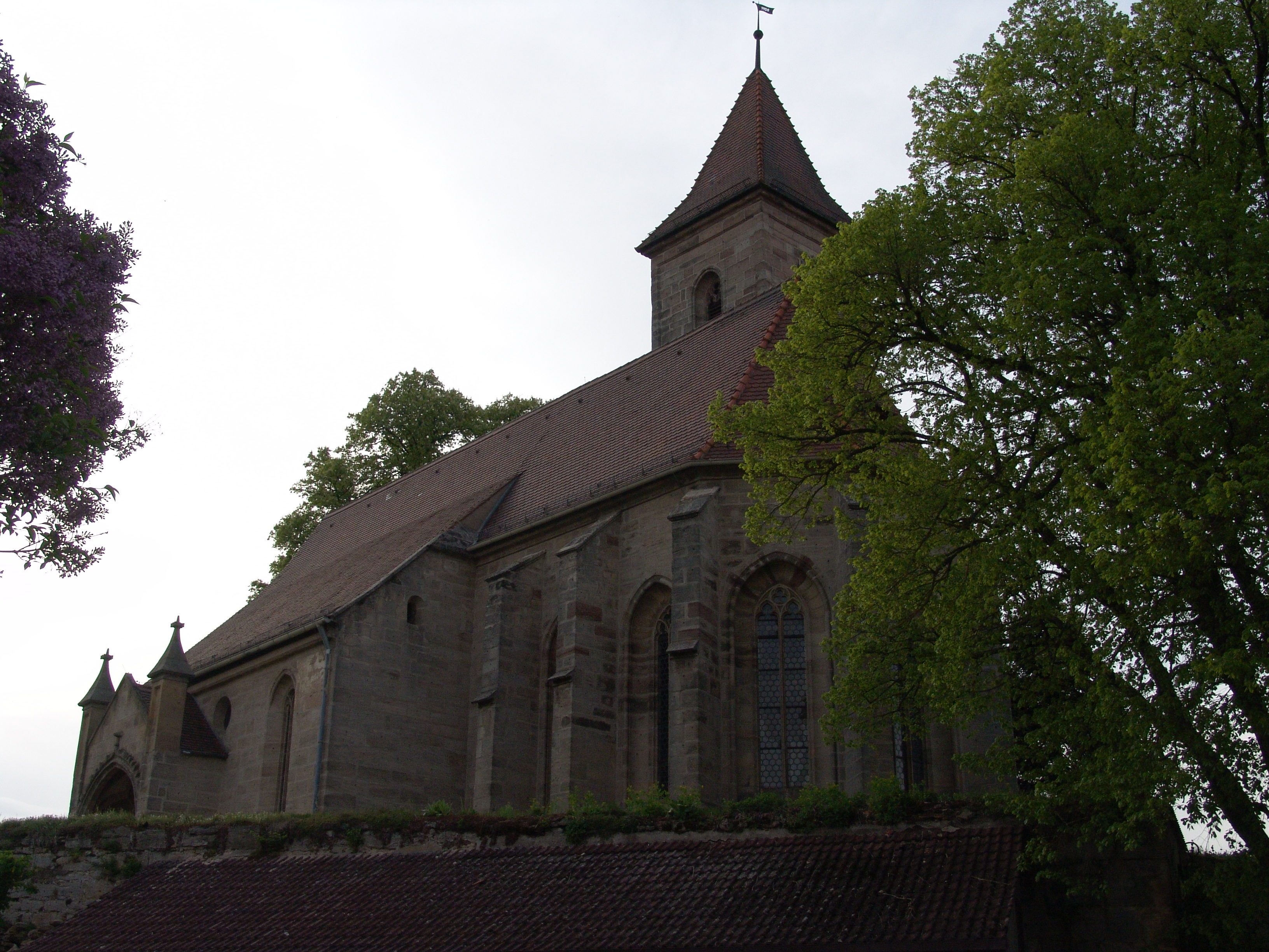 evang.-luth. Marienkirche Zur Lieben Frau in Dorfkemmathen